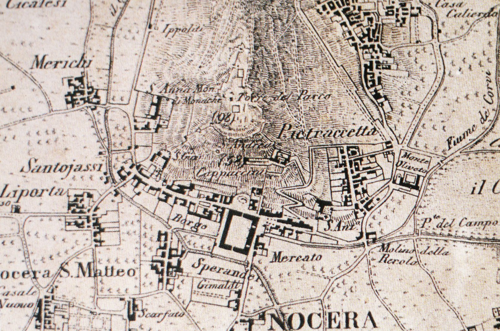 Carta topografica del tenimento di Nocera nel 1831